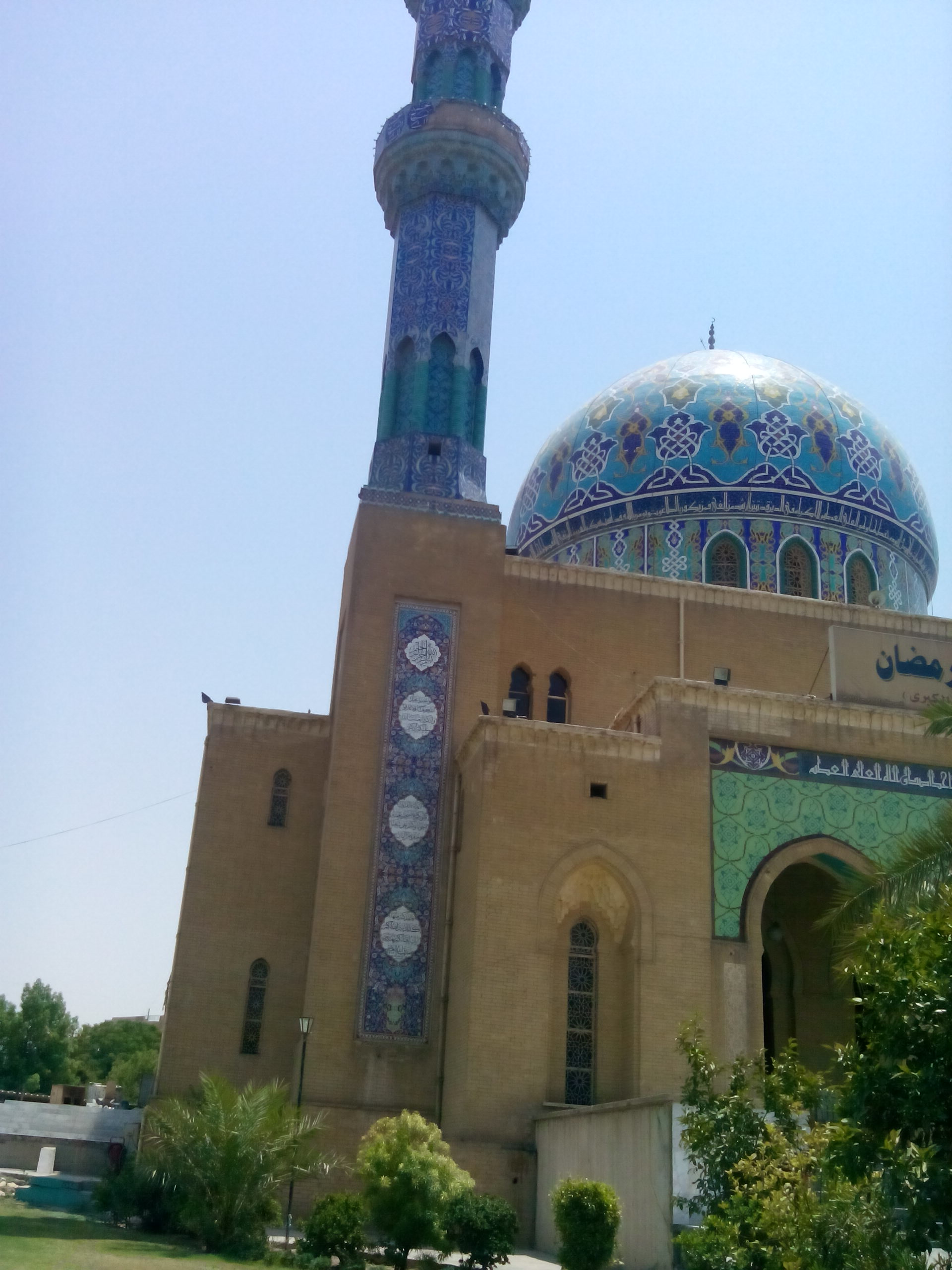 مبنى جامع 17 رمضان في بغداد